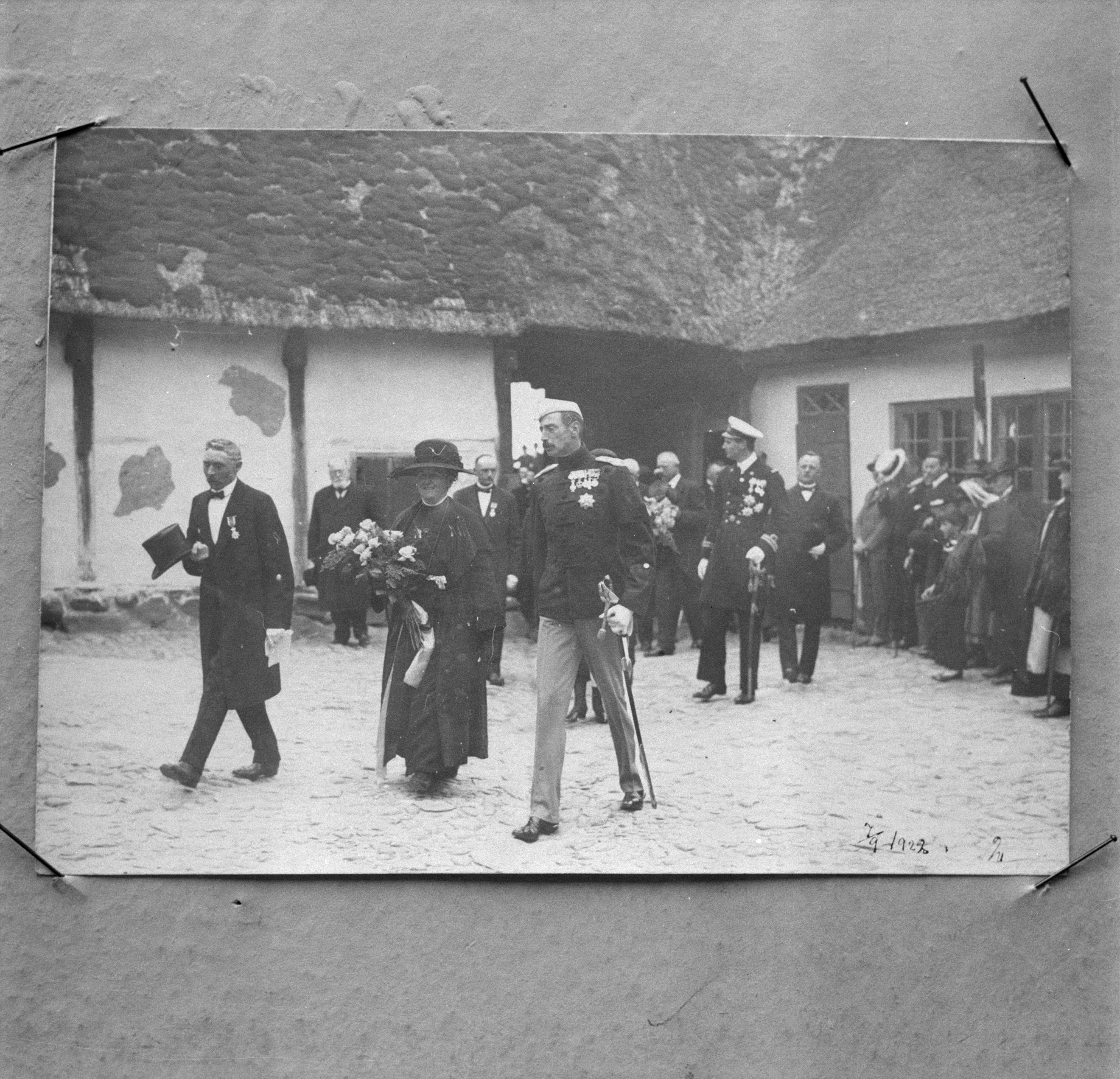 Collectie / Archief : Fotocollectie Van de Poll Reportage / Serie : Familie Dirchsen op hun boerderij Hollaendergaard Beschrijving : Foto van het bezoek van Koningin Wilhelmina aan de boerderij Hollaendergaard als onderdeel van het staatsbezoek aan Denemarken op 07 september 1922 Datum : maart 1954 Locatie : Denemarken, Store Magleby Trefwoorden : boerderijen, foto's, koninginnen, koninklijke bezoeken, uniformen Persoonsnaam : Wilhelmina, koningin Fotograaf : [onbekend] Auteursrechthebbende : Nationaal Archief Materiaalsoort : Negatief (zwart/wit) Nummer archiefinventaris : bekijk toegang 2.24.14.02 Bestanddeelnummer : 252-8790